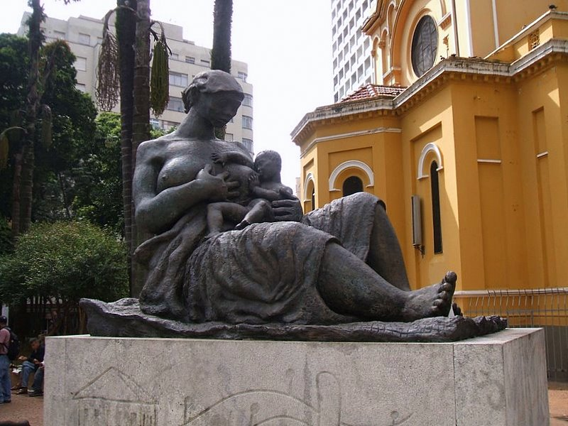 Júlio Guerra - Mãe Preta. Escultura no Largo do Paiçandu, junto à Igreja do Rosário. São Paulo, SP, Brasil.